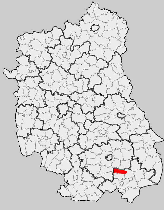 Map of gmina Krynice, Tomaszów Lubelski county, Lublin voivodship Mapa gminy Krynice, powiat tomaszowski, województwo lubelskie